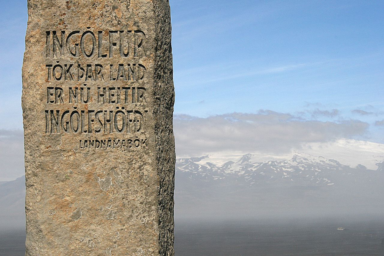 Island, dag 4. Ingólfshöfði. Platsen där den första isländska invånare landade...